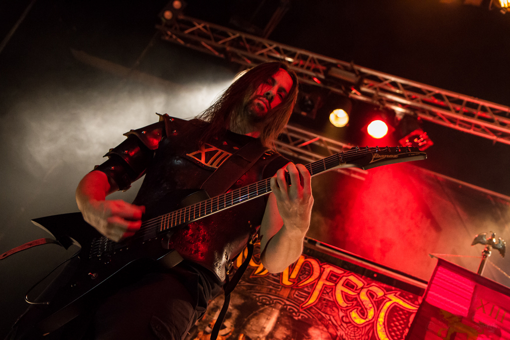 Ex Deo - Paganfest 2013 Wuerzburg - 01-03-2013